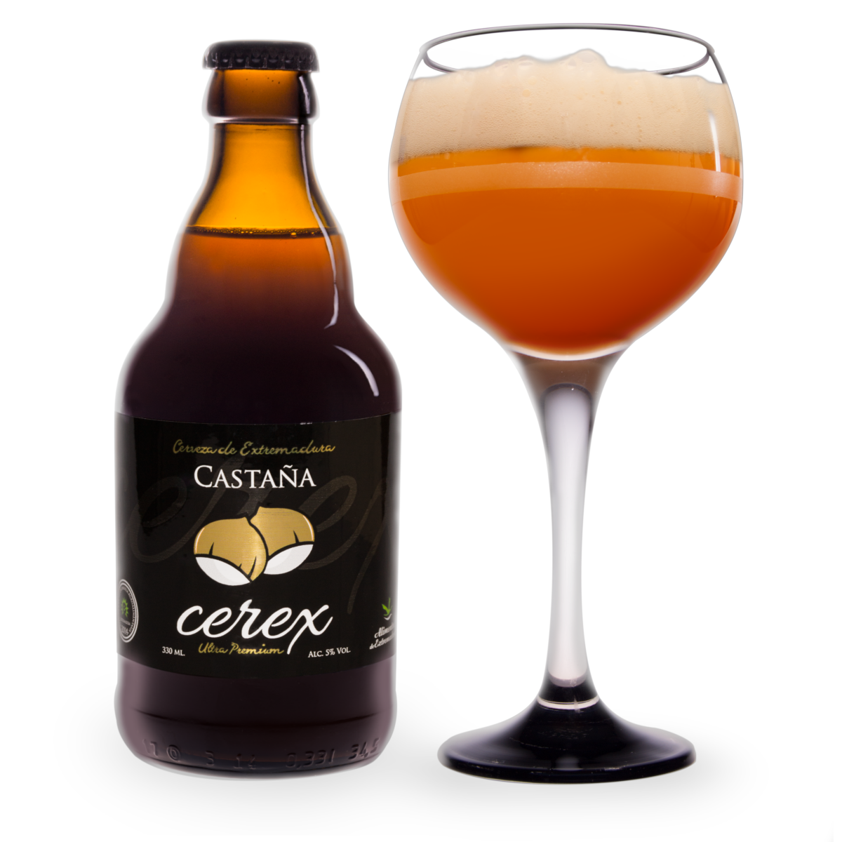 Cerveza ahumada con sabor a castaña